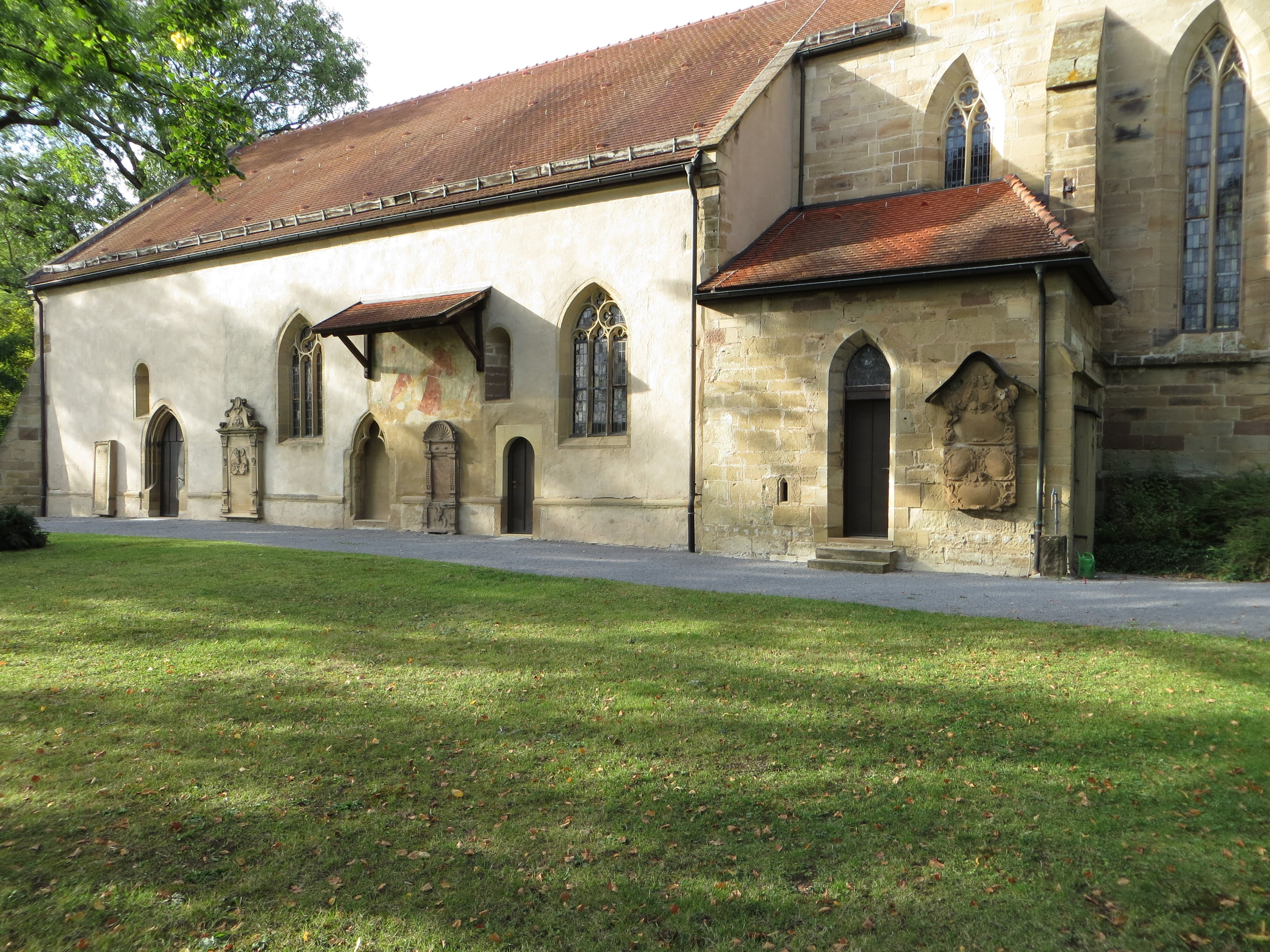 Das Schiff der Johanniskirche auf dem Brackenheimer Friedhof von Südosten